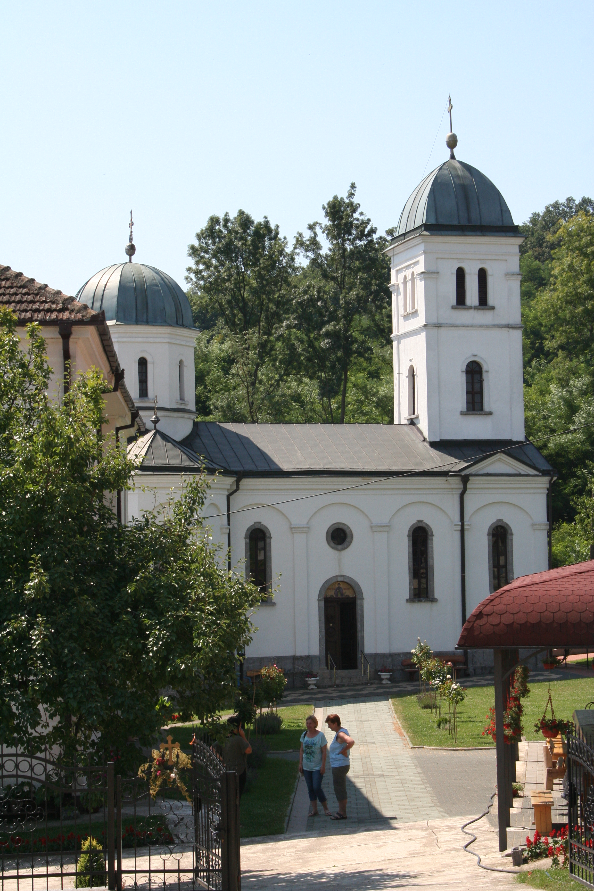 Manastir Petkovica